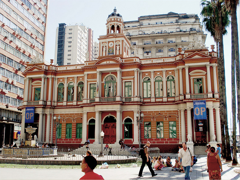 Prefeitura Velha, Porto Alegre, Brasil.